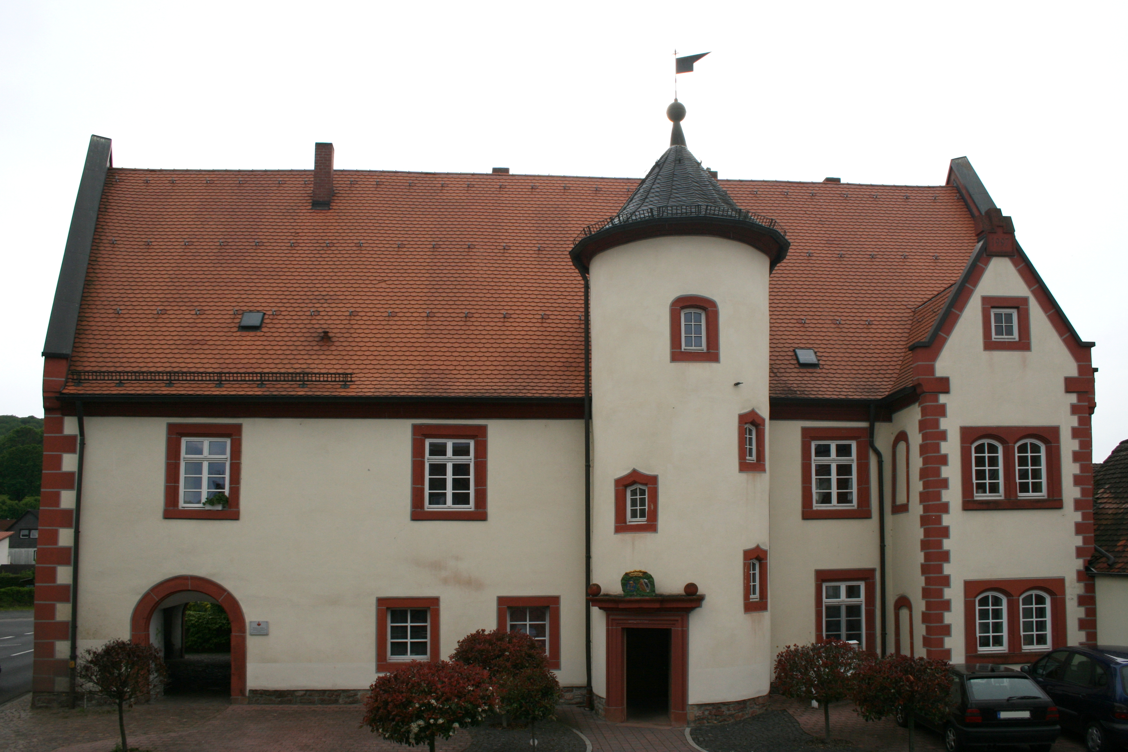 Schloss Wirtheim, Gemeinde Biebergemünd in Hessen, frontale Ansicht der Hofseite.